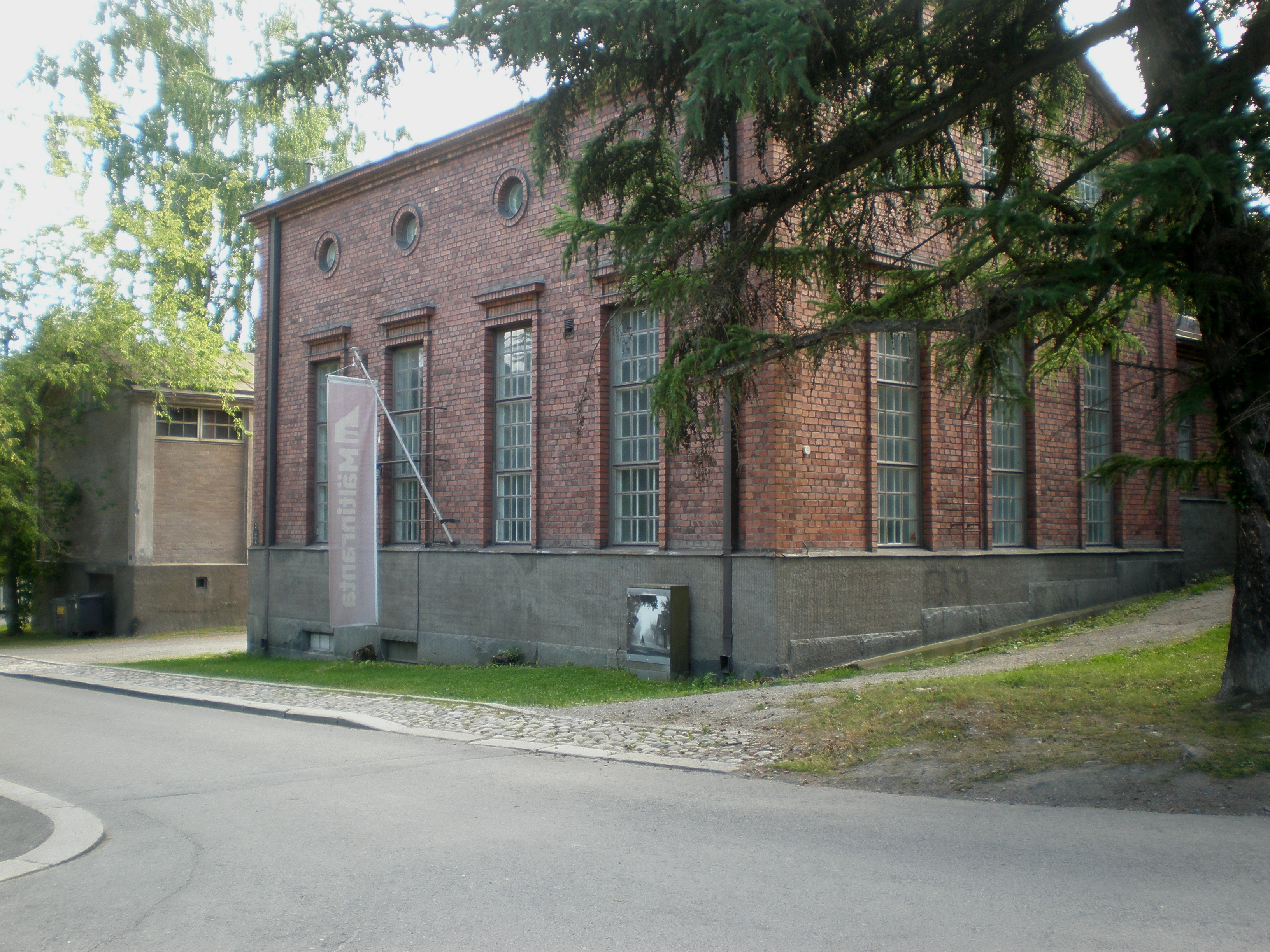 Taidekeskus Mältinranta